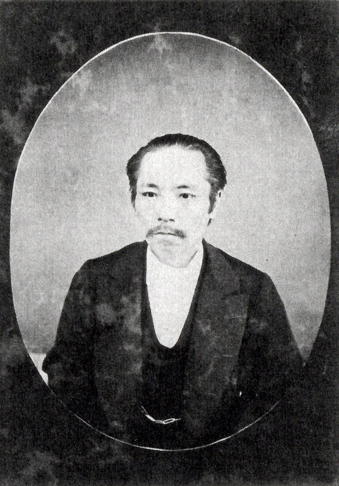 千種有任の肖像写真。